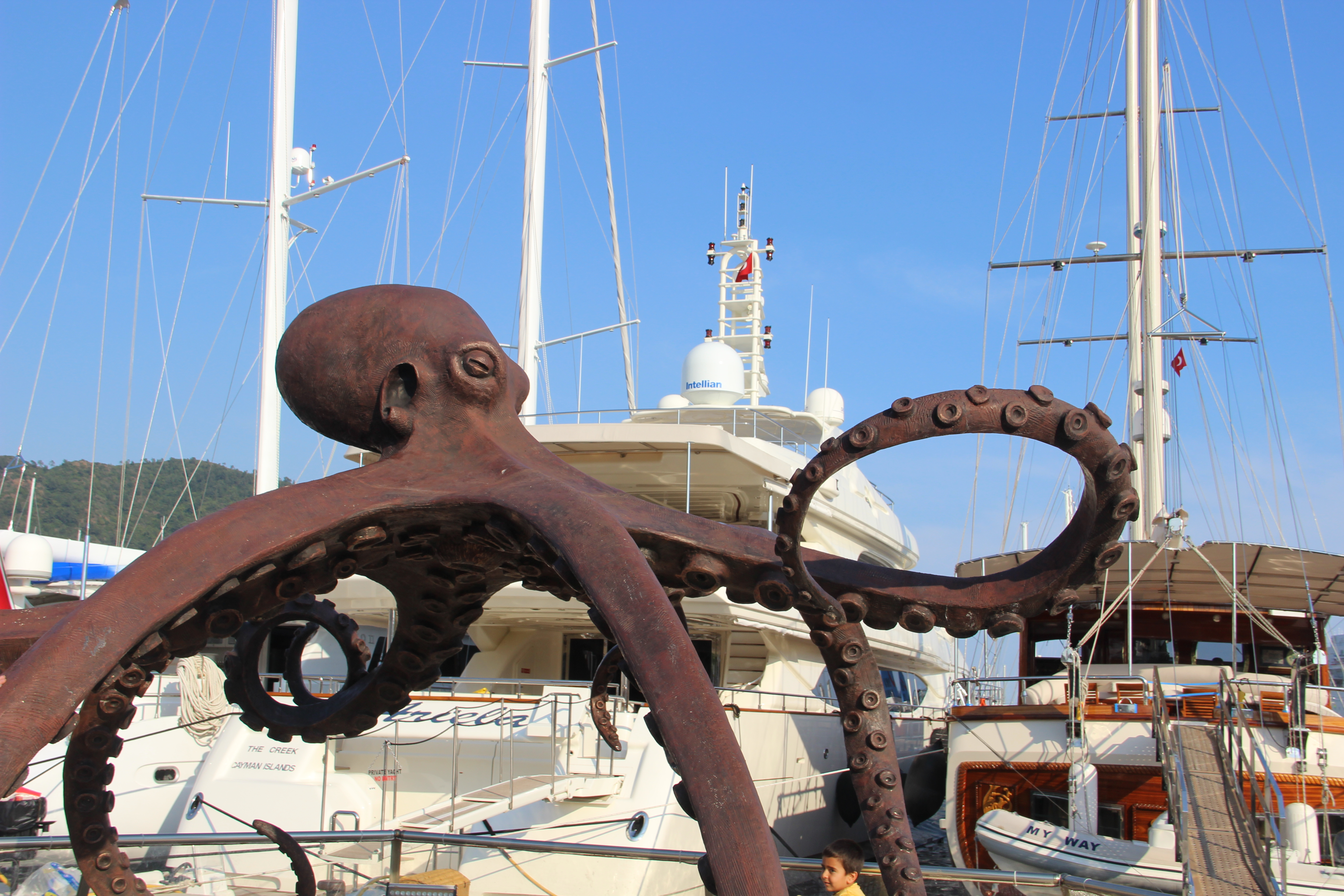 Скульптура Осьминог. Marmaris. Mugla. Turkey. Июнь 2015